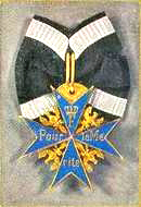 Décoration "Pour le Mérite" Source: Wikipédia de